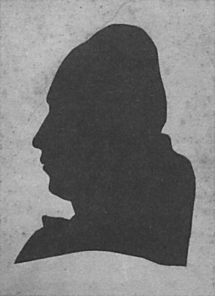 Schattenriss Johann Hermann Franz Freiherr von Pape, genannt Papius, heute Städtische Museen Wetzlar